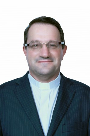 Bispo da Diocese de Marabá